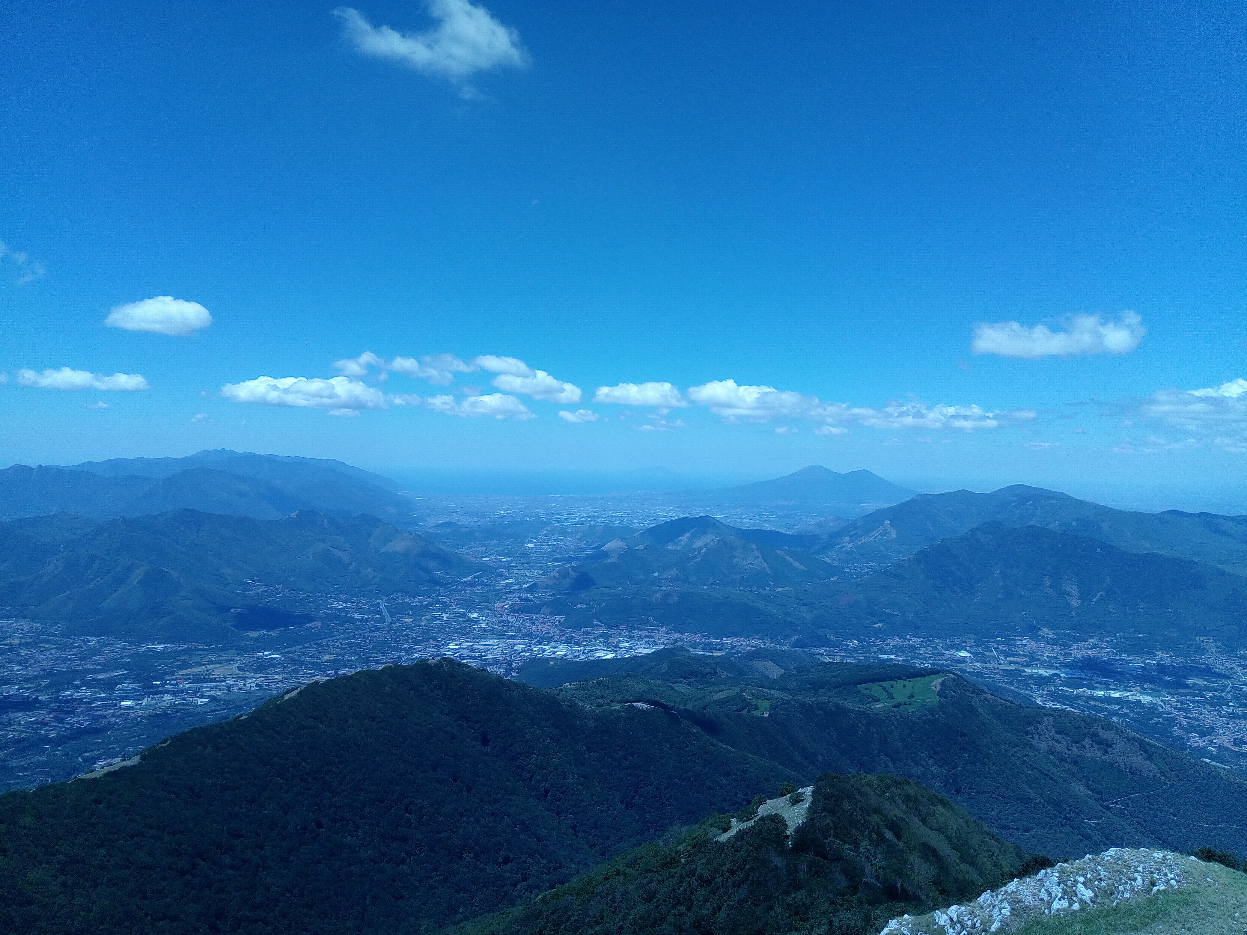 Parte del panorama visibile dal Pizzo di San Michele